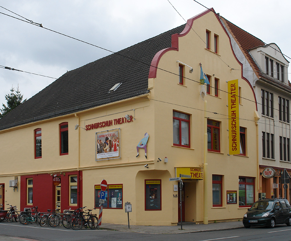 Das Theaterhaus Schnürschuh in Bremen, Buntentorsteinweg 145